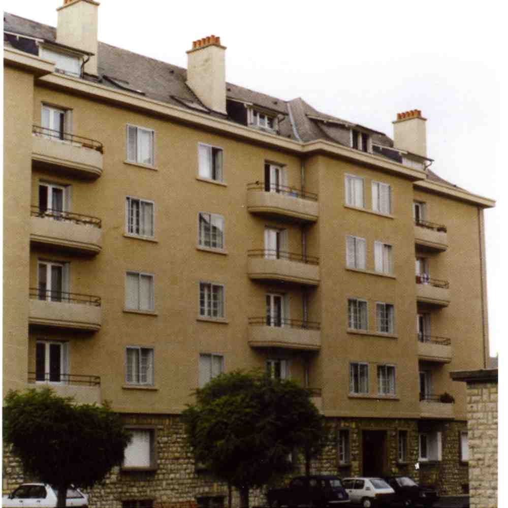 Le Martinet, architecte M. Lambert